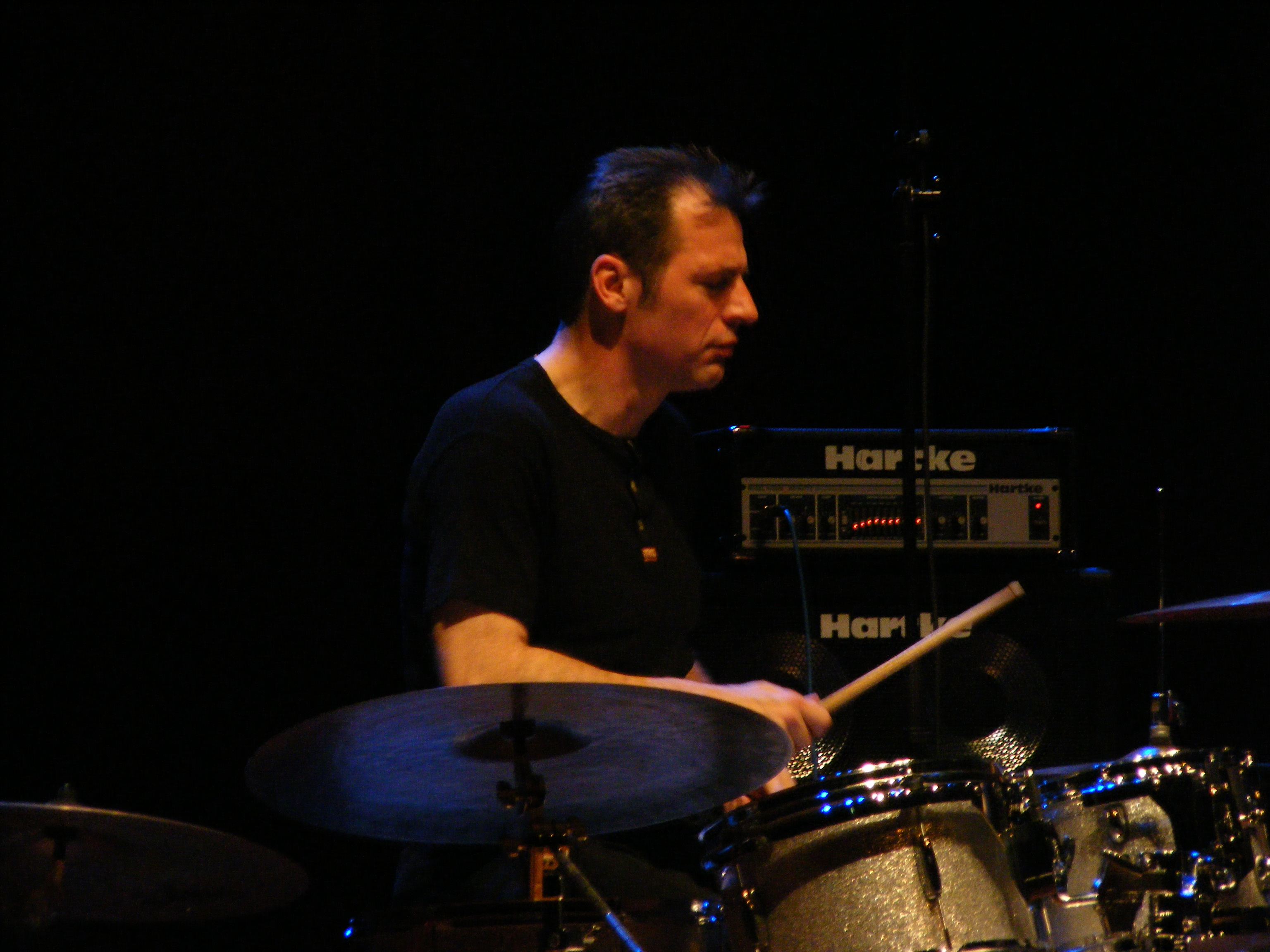 Auftritt im Martial Solal Trio am 05.05.2009 in Dudelange (Luxemburg)